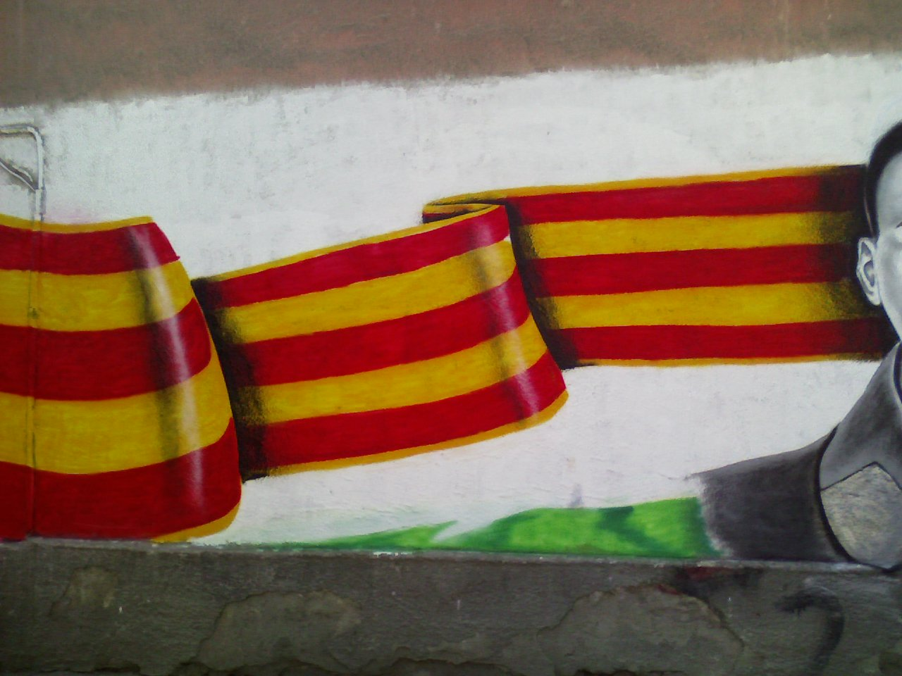 Красно-жёлтая лента Победы в Кыргызстане